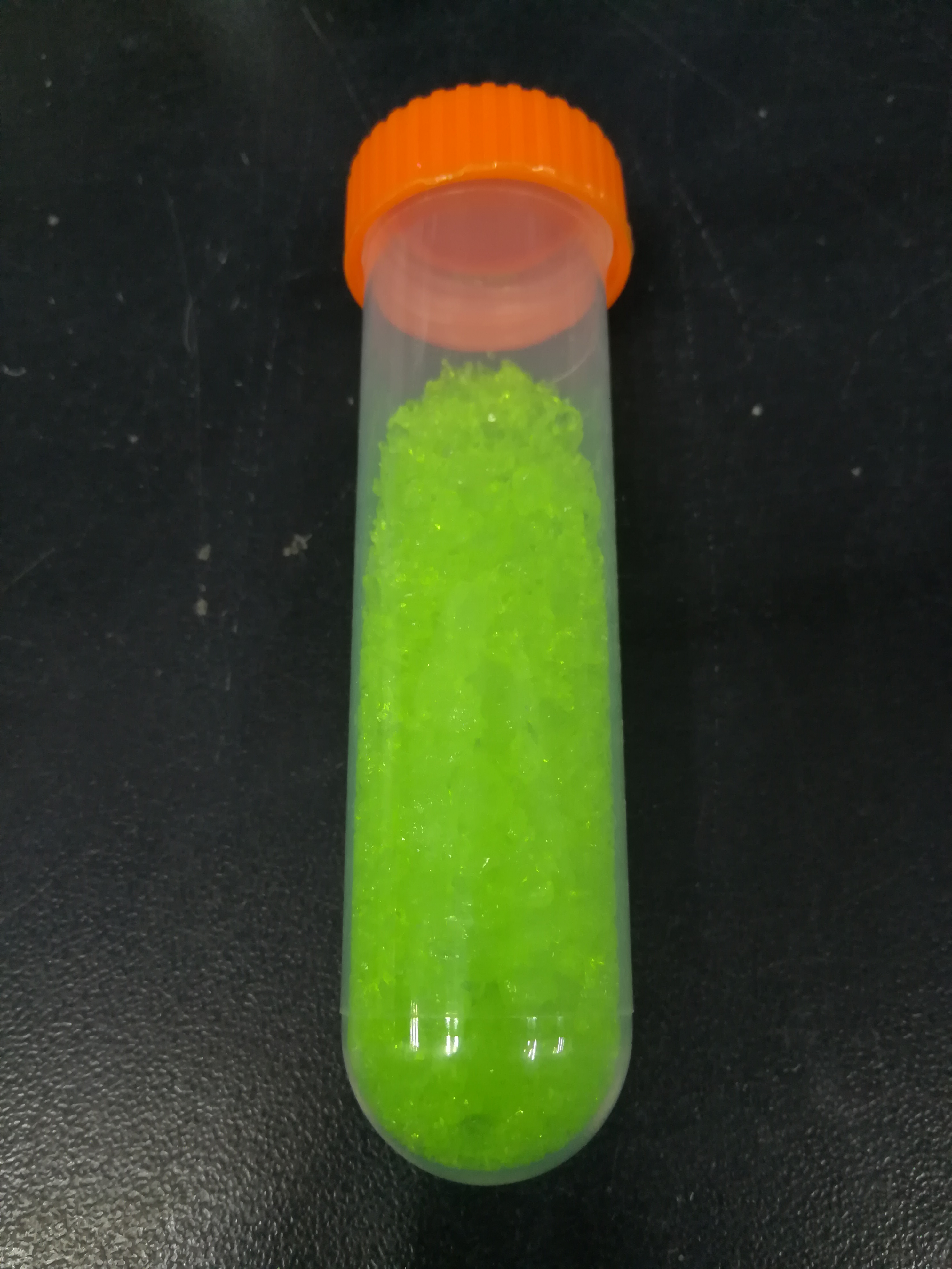 硝酸镨（水合）